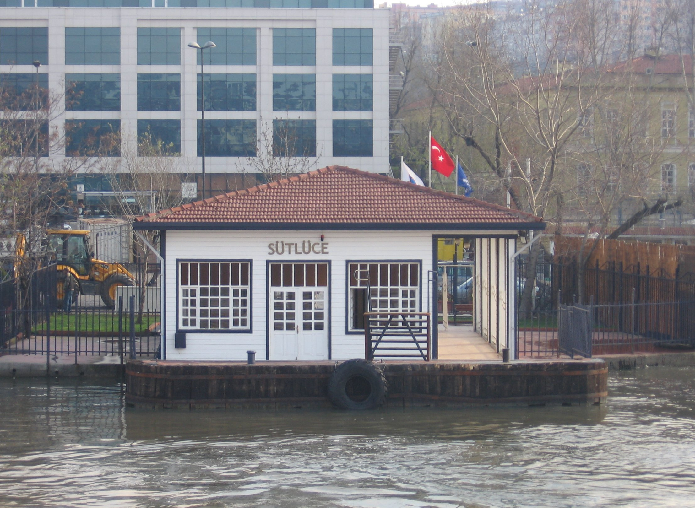 Sütlüce İskelesi